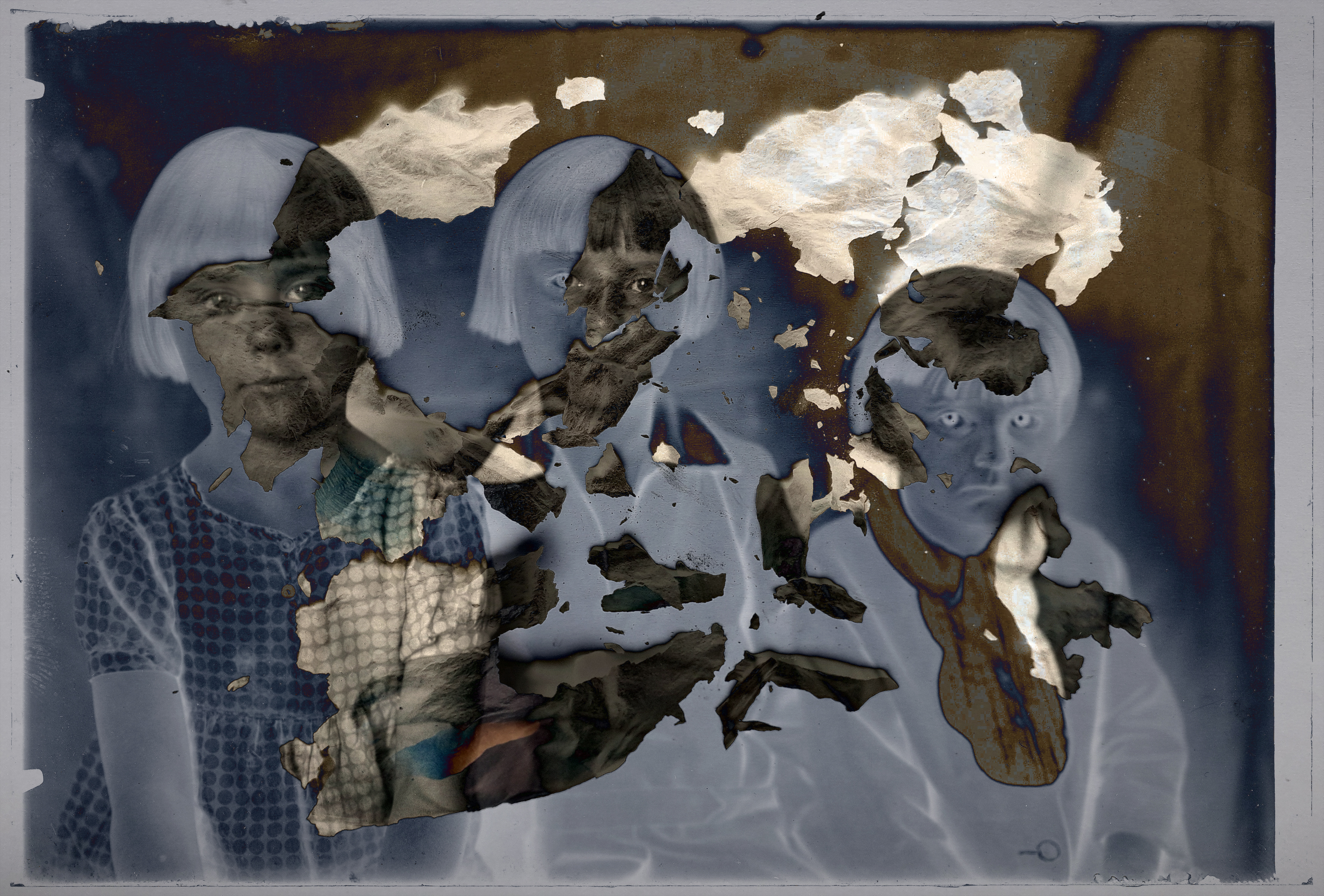 Wychodząc od połączenia fotografii z tkankami wypalonego papieru (na zasadzie kolażu tradycyjnego i cyfrowego lub bezpośredniej ingerencji w reprodukcję lub cyfrowy oryginał), a także analizując zbiory, udostępnione przez instytucje kultury mogę łączyć wyselekcjonowany przeze mnie materiał w grupy tematyczne, budować między nimi dialog, umieszczając je w różnym kontekście, budować mapy powiązań, tworzyć kontrasty i nowe znaczenia.